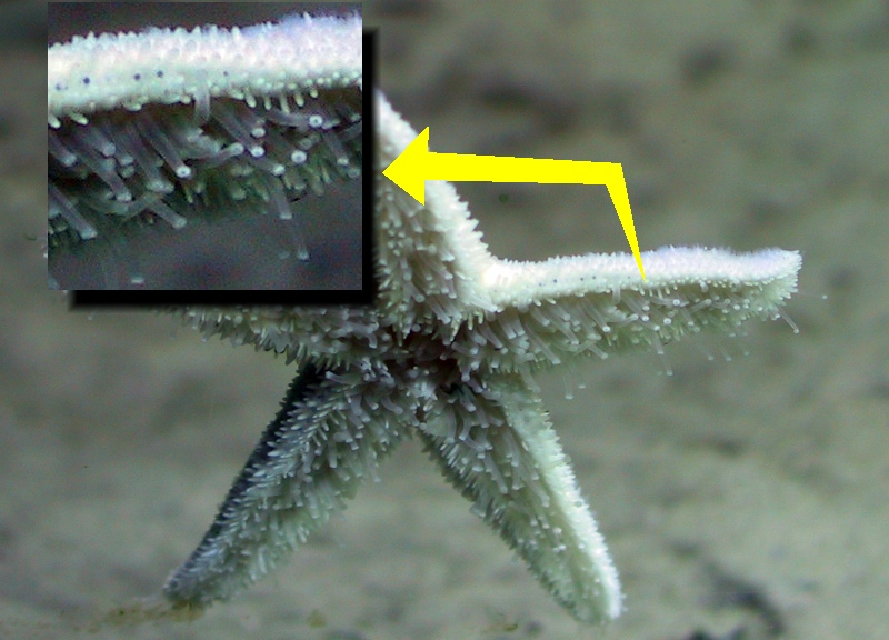 Seestern, starfish, Aquarium, St. Peter-ording, Deutschland, Germany